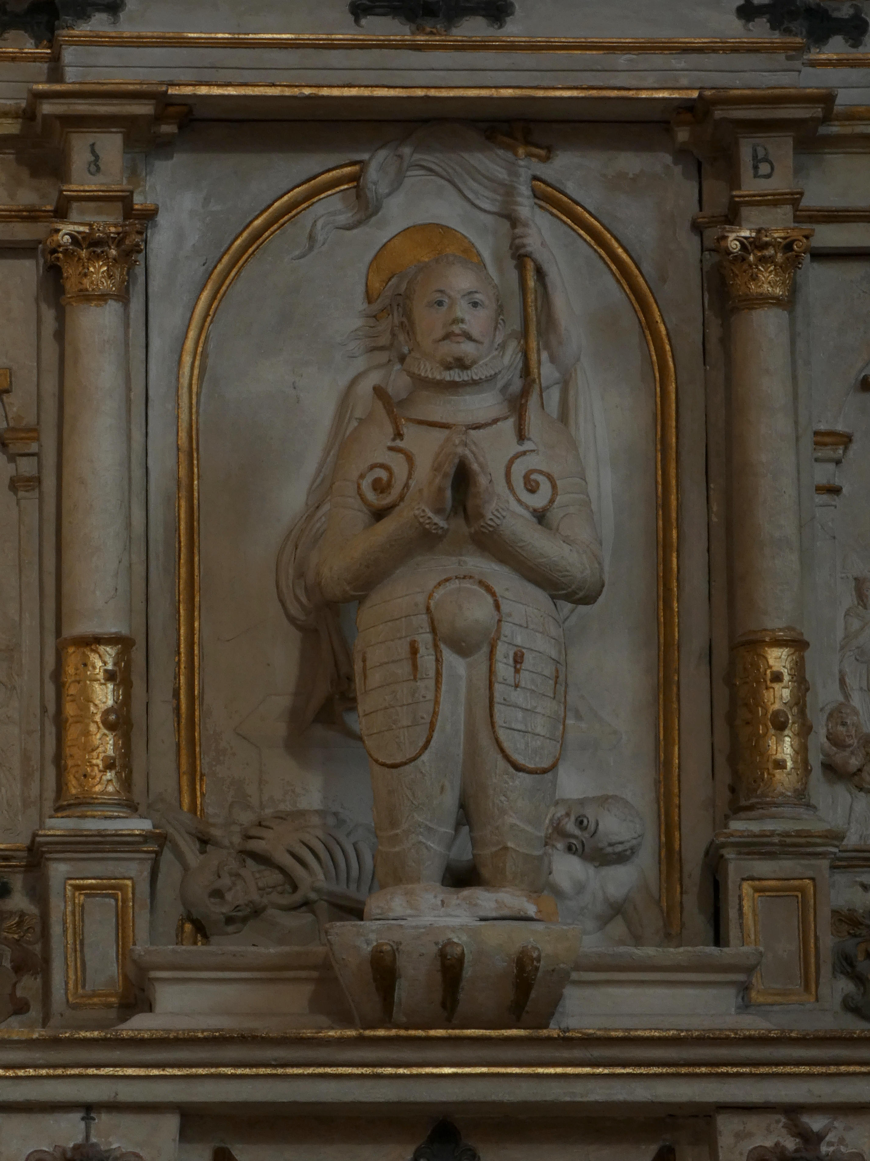 Epitaph Georg Hahn Ausschnitt, St. Gotthardt